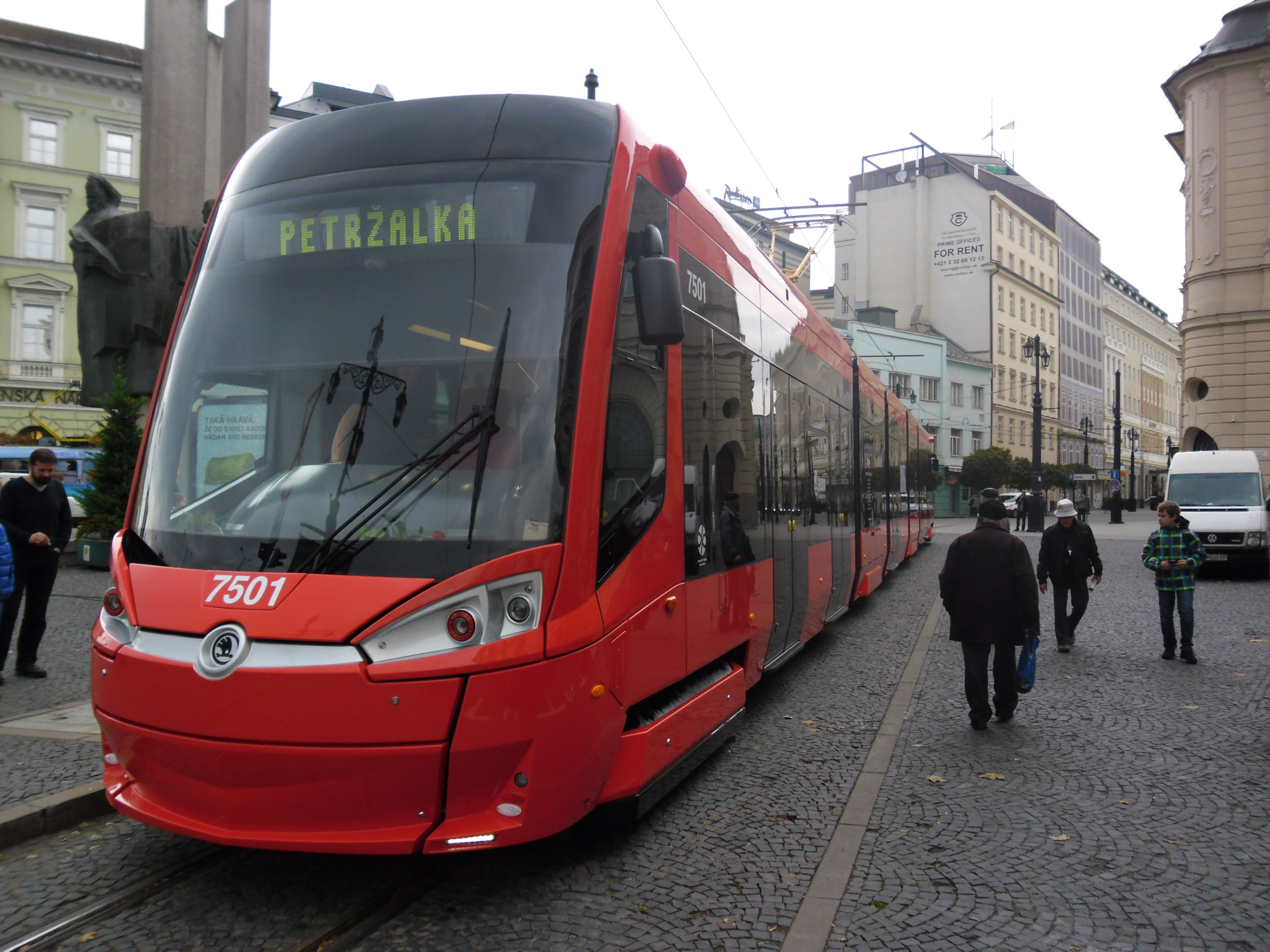 Škoda 30T na slávnostnej prezentácii